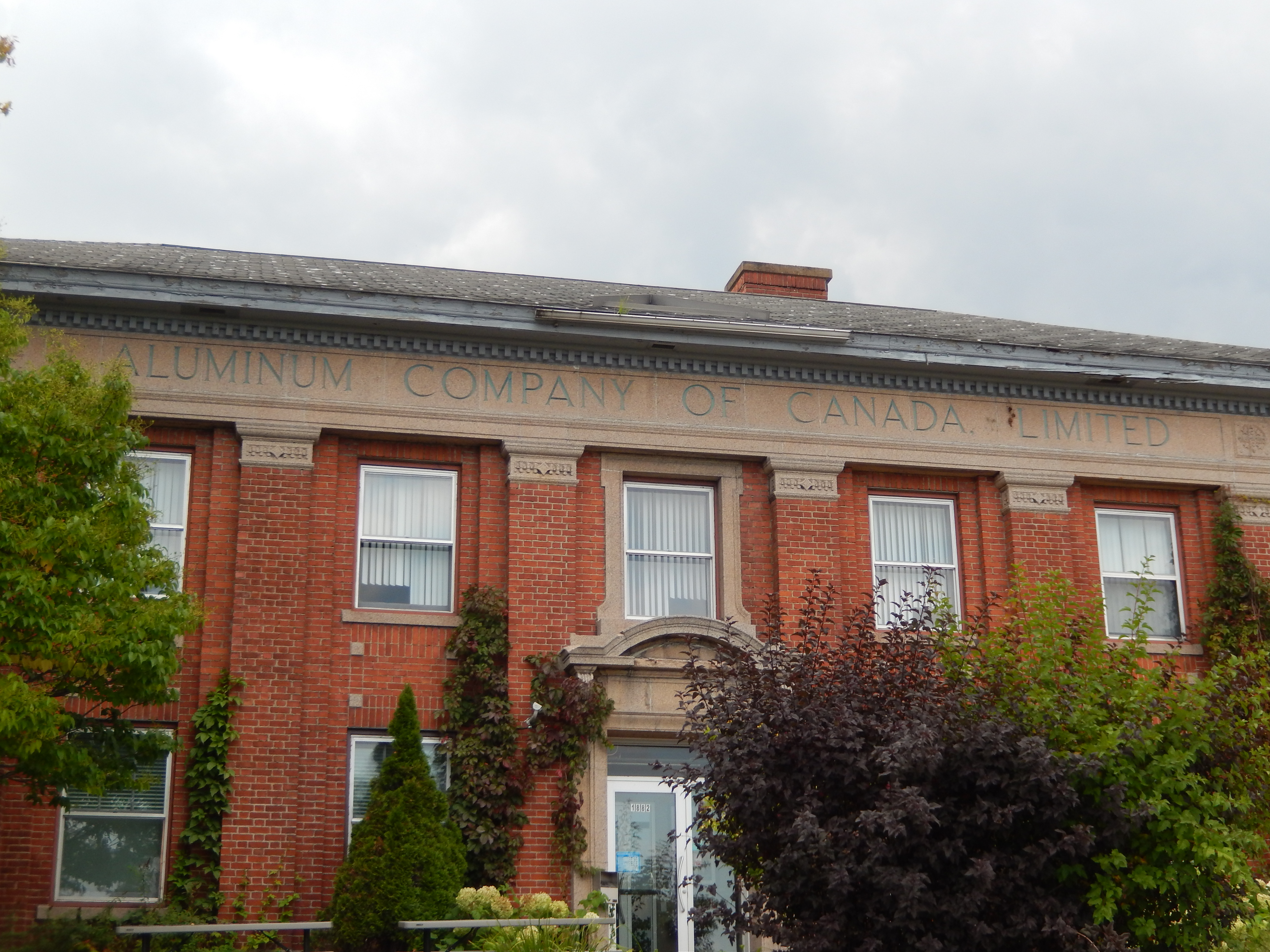 Bâtiment AL-22 de l'ancienne aluminerie de Shawinigan.